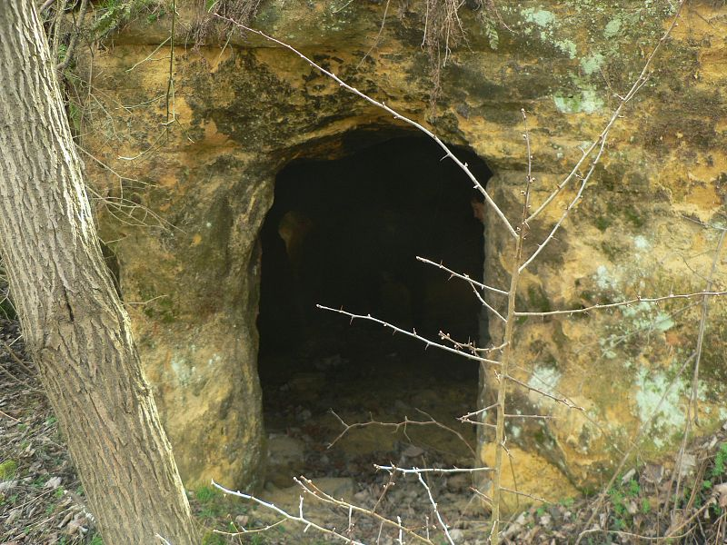 Svébořice, Ralsko, Czech Republic